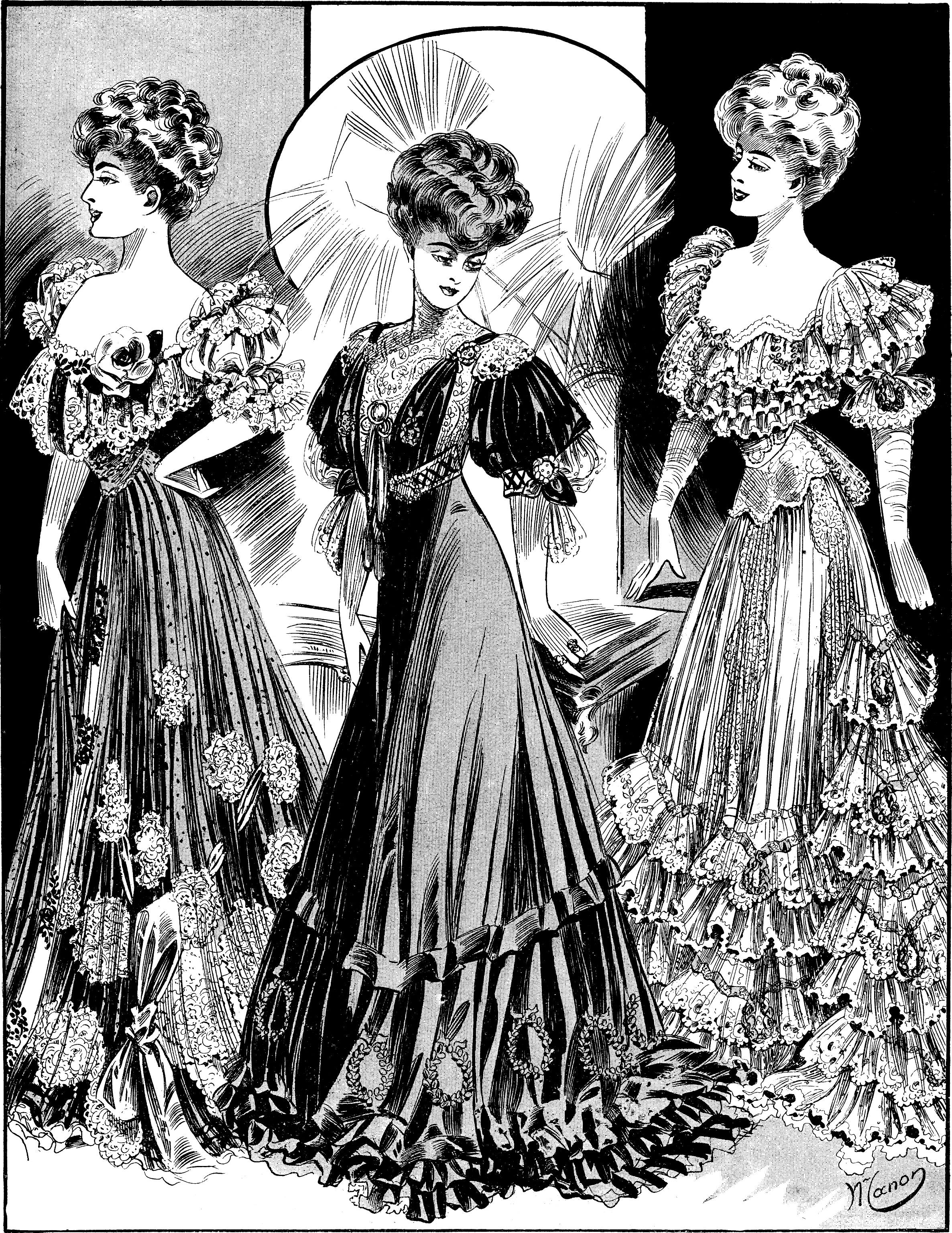 Toiletters, par Mmes Boué Sœurs